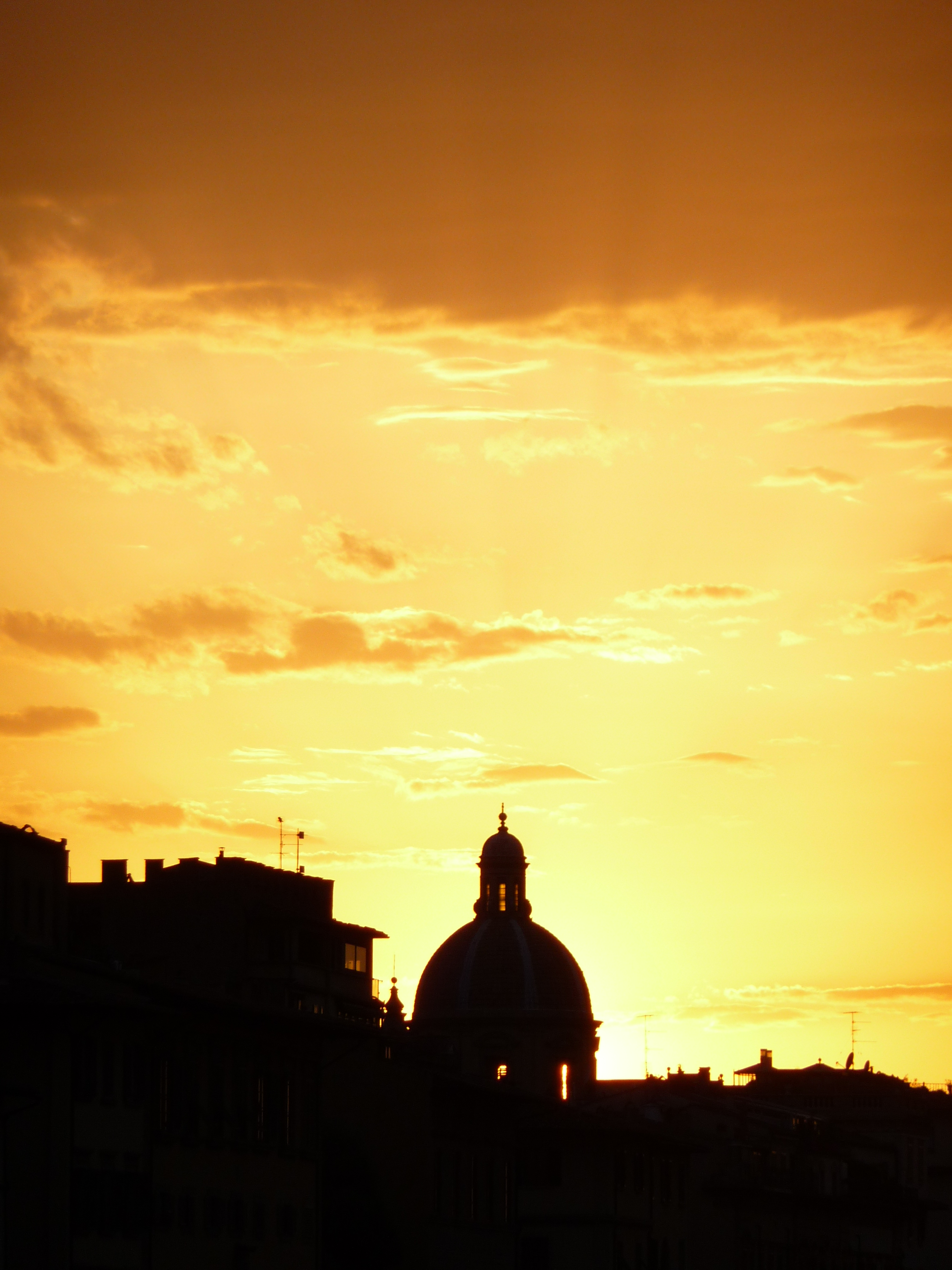 Una foto presa a coricarlo di sole (20 agosto 2010). This is a photo of a monument which is part of cultural heritage of Italy.